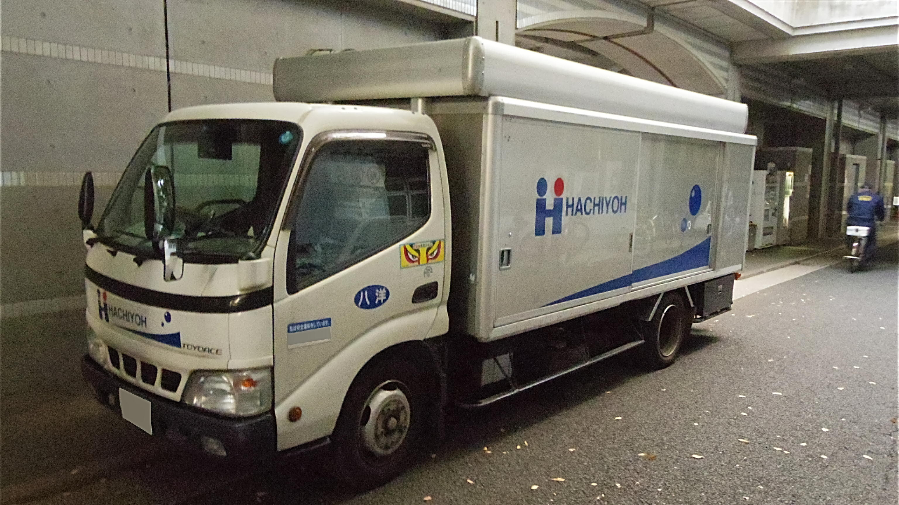 自動販売機サービスの「株式会社八洋」の配送トラック（トヨタ・トヨエース）。2015年10月24日、武蔵野陸上競技場１階通路にて撮影（なお、この日はサッカー・JFL「横河武蔵野FC」対「FC大阪」戦が行われていました）。 ※Paintgraphic3にて処理（ドライバー名、ナンバープレート部分をぼかし）。